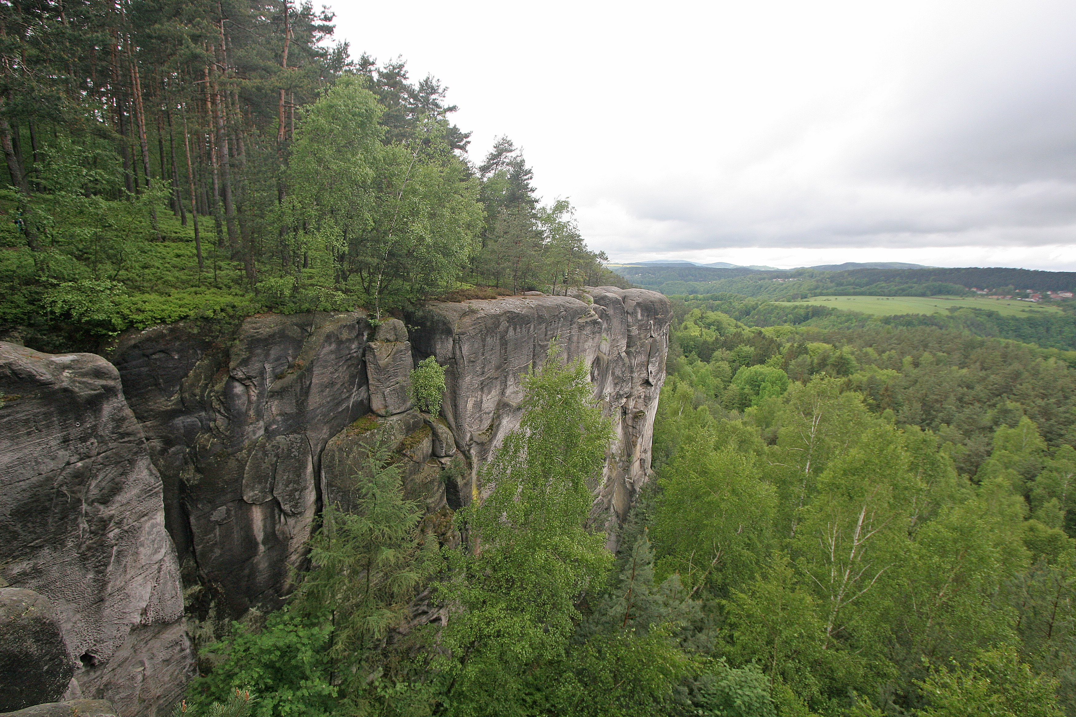 Klokočské skály - pohled z okraje kuesty Project: Chráněná území.